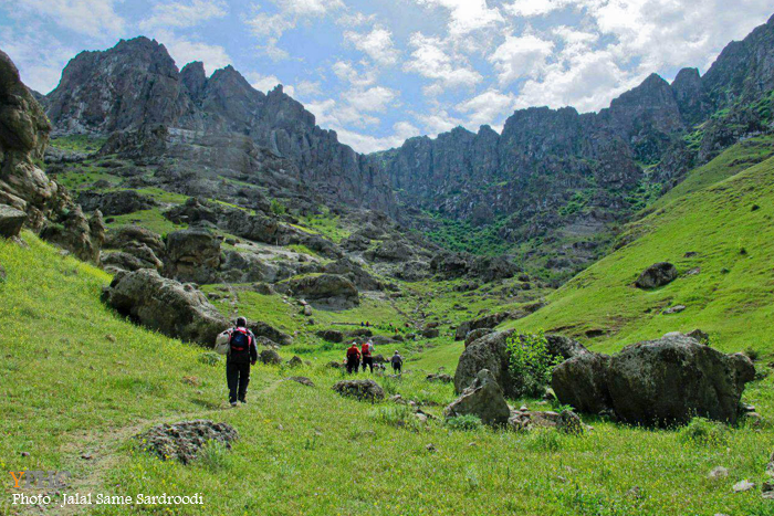 شهرستان هوراند شهرستان هوراند در شمال شرقی استان آذربایجان شرقی قرار دارد ، منطقه ی هوراند به دلیل جغرافیای خاص از پوشش گیاهی و طبیعت منحصر به فردی برخوردار است به طوری که برای طبیعت گردان یک هدف ناب برای ماجراجویی و عکاسی محسوب می شود.منطقه ی زیبای هوراند از کوههای بلند و سربه فلک کشیده و درختان گوناگون تشکیل شده است که هر بیننده ‌ای را جادو می کند.